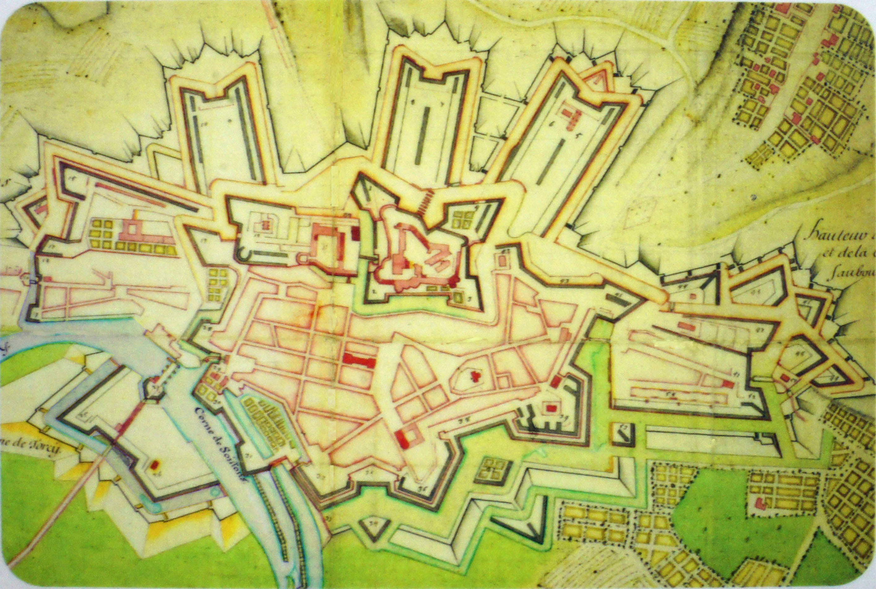 Plan de Sedan.